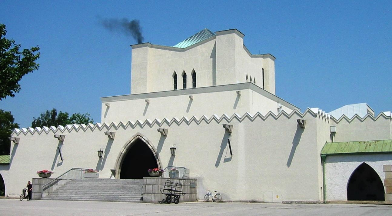 Wiener Zentralfriedhof, Krematorium